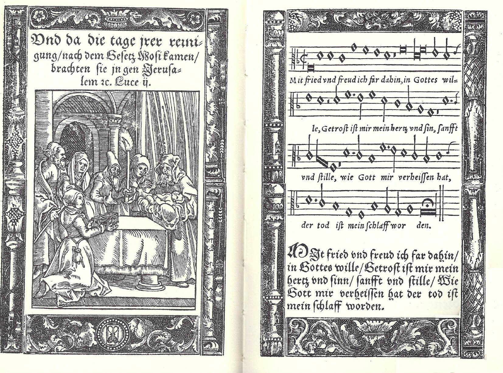 Mit Fried und Freud ich fahr dahin mit Abbildung der Darstellung Jesu im Tempel (1545)